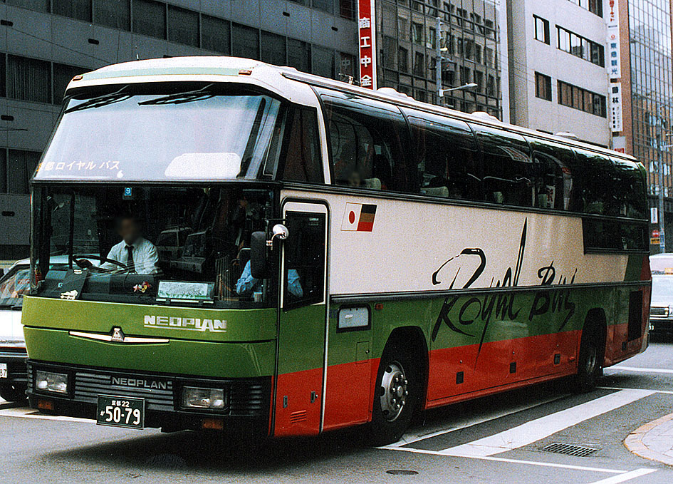 京都ロイヤルバス ネオプランシティライナーN116/2